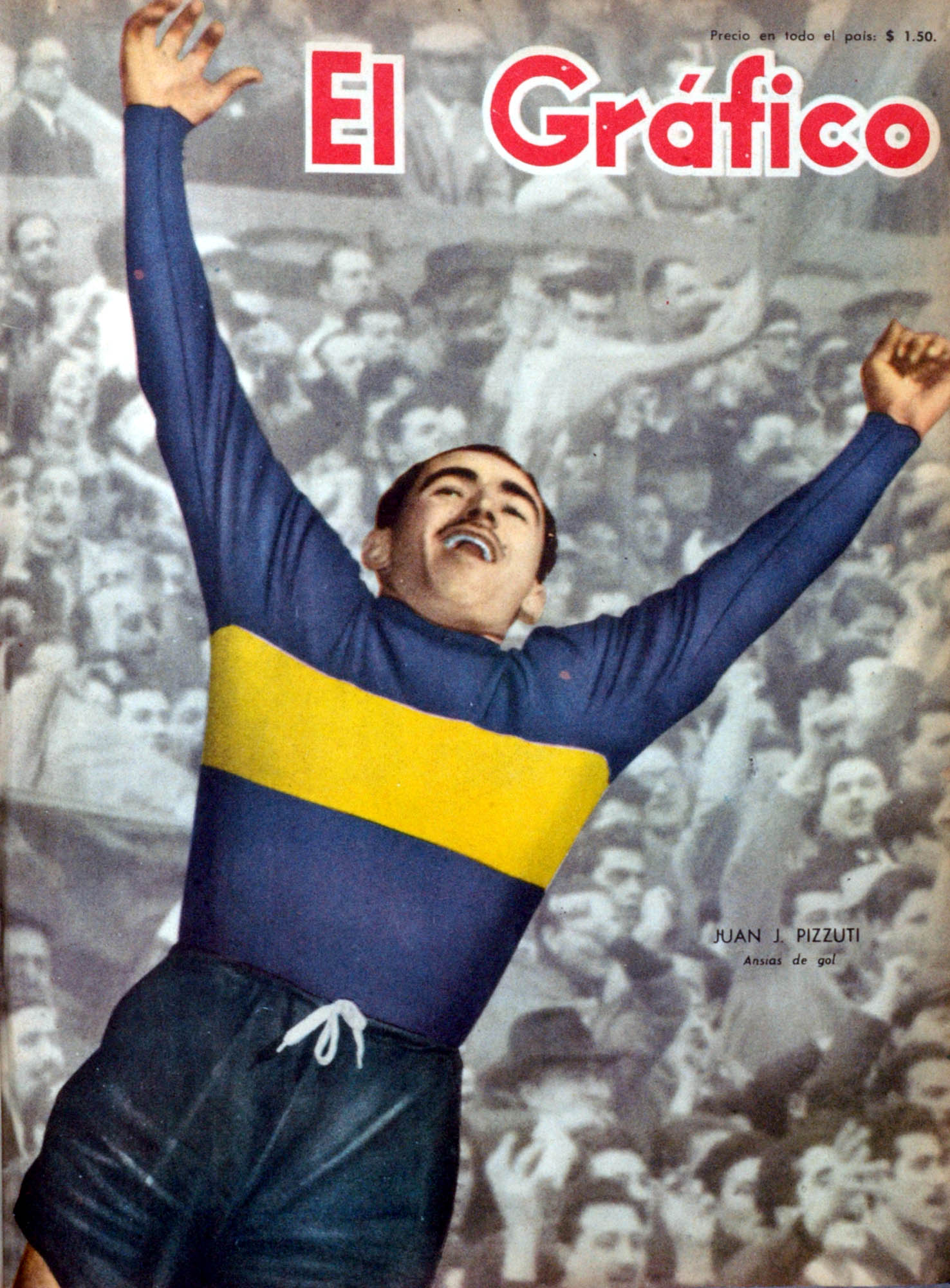 El Grafico del 14 de Octubre de 1955. Edicion 1886